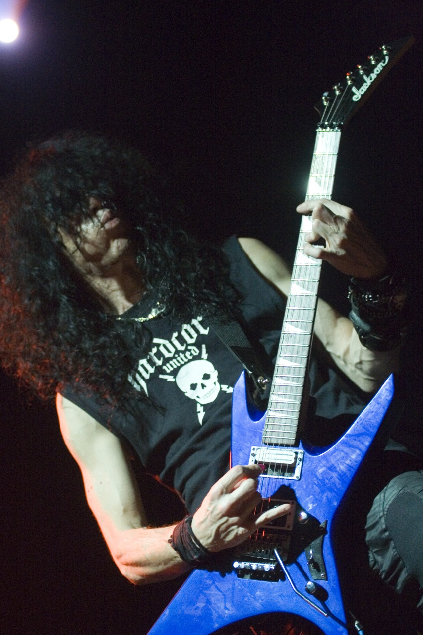 Trey Azagthoth of Morbid Angel Live @ Santana Hall - 08/03/2009 - São Paulo, Brasil Fotógrafo: Alexandre Cardoso